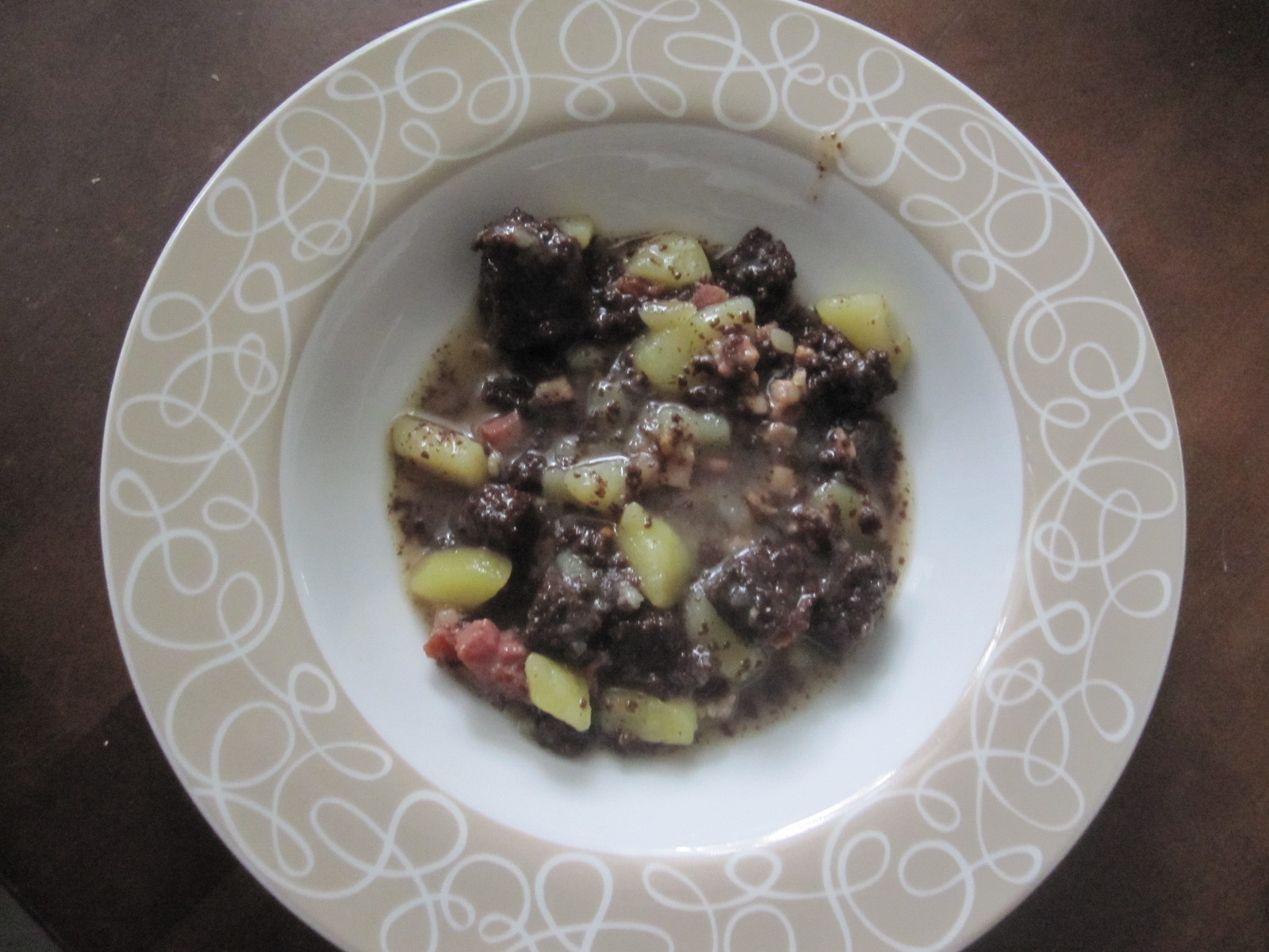 Suomalaista perinneruokaa rössypottua lautasella.